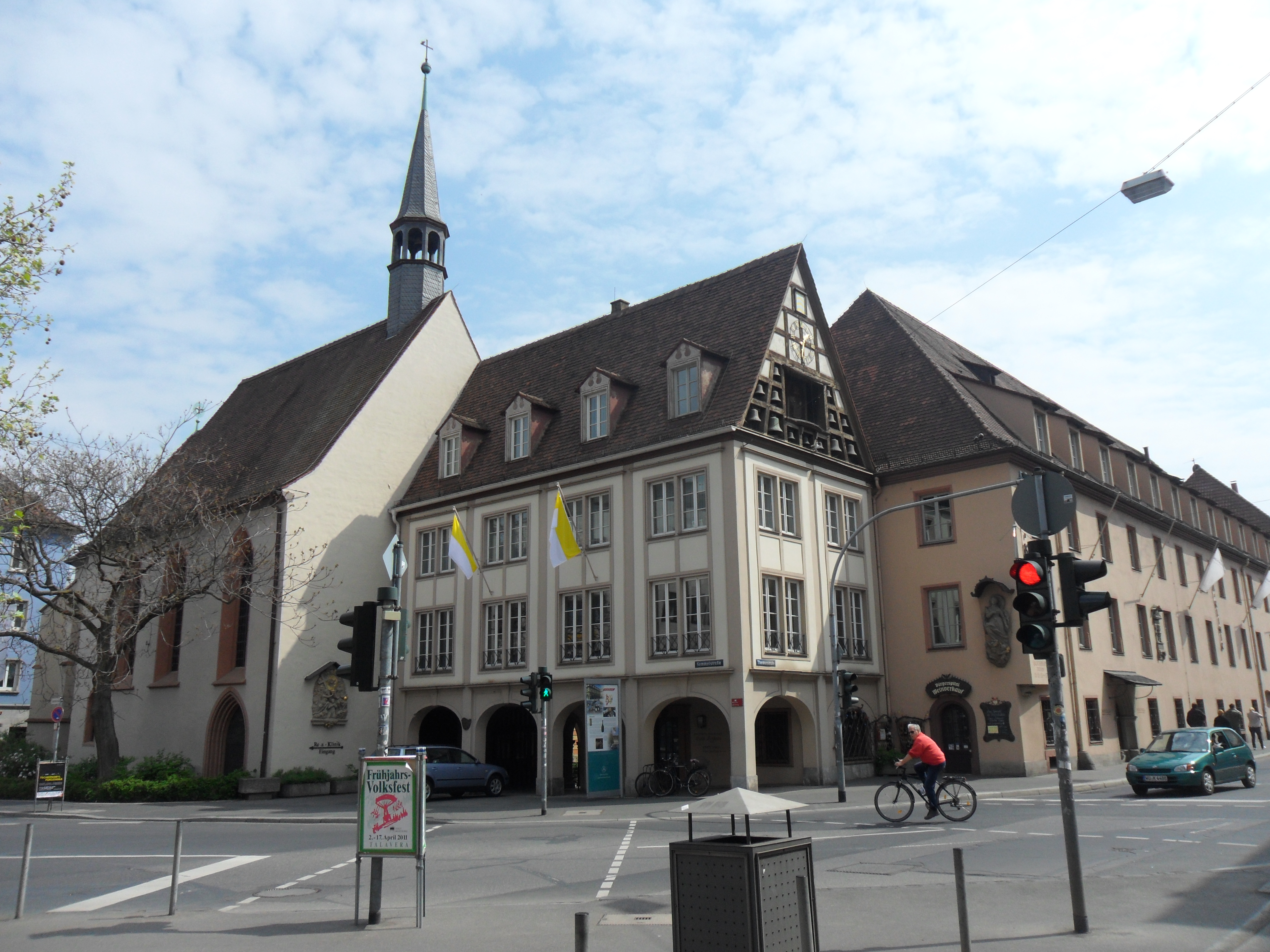 Das Bürgerspital zum Hl. Geist an der Ecke Semmelstraße/Theaterstraße in Würzburg